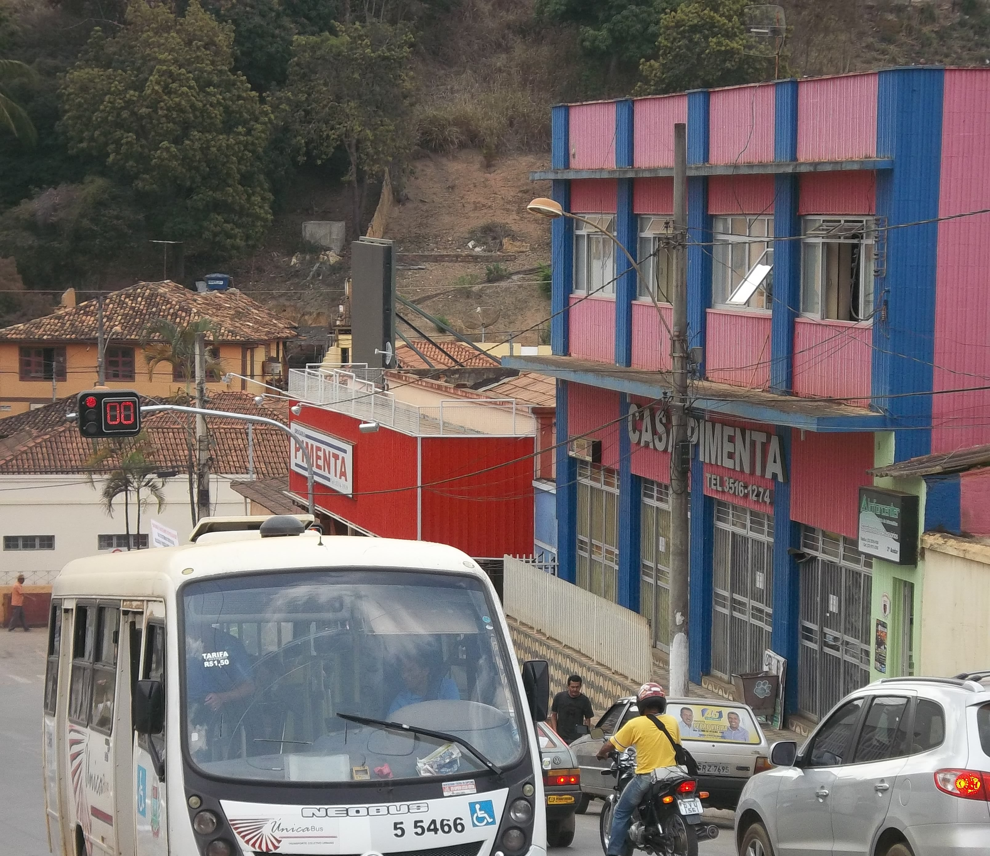 Trânsito e Semáforos em Capelinha - MG